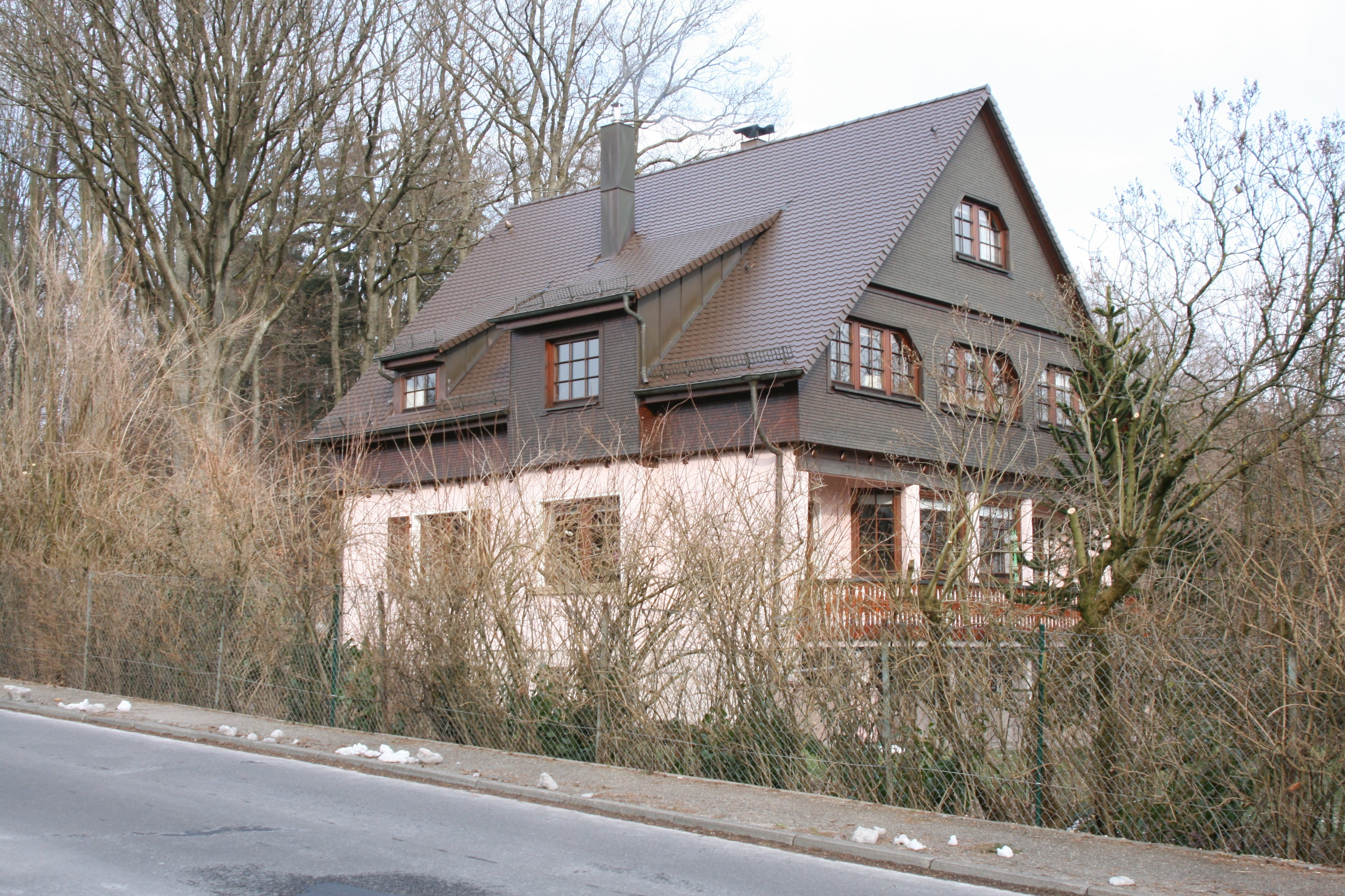 Wüstenrot, Ehemalige Villa Kropp, Löwensteiner Straße 48